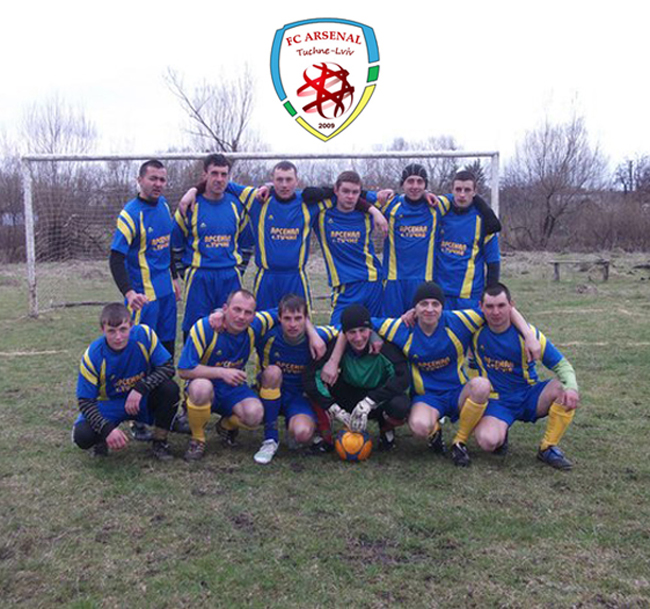 Футбольна команда "Арсенал" с.Тучне Перемишлянського району